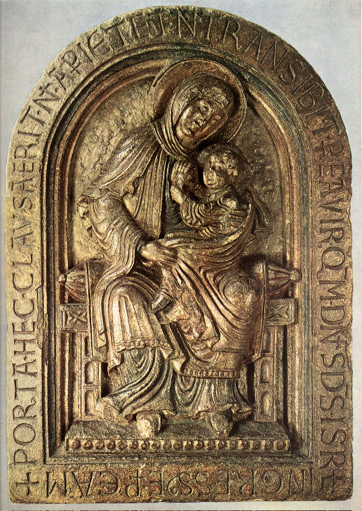 Haut-relief taillé dans du grès houiller liégeois, représentant la Vierge Marie et son divin enfant. Musée Curtius Liège. Une copie se trouve au casernement Saint-Laurent Liège (ancienne abbaye bénédictine de Saint-Laurent).